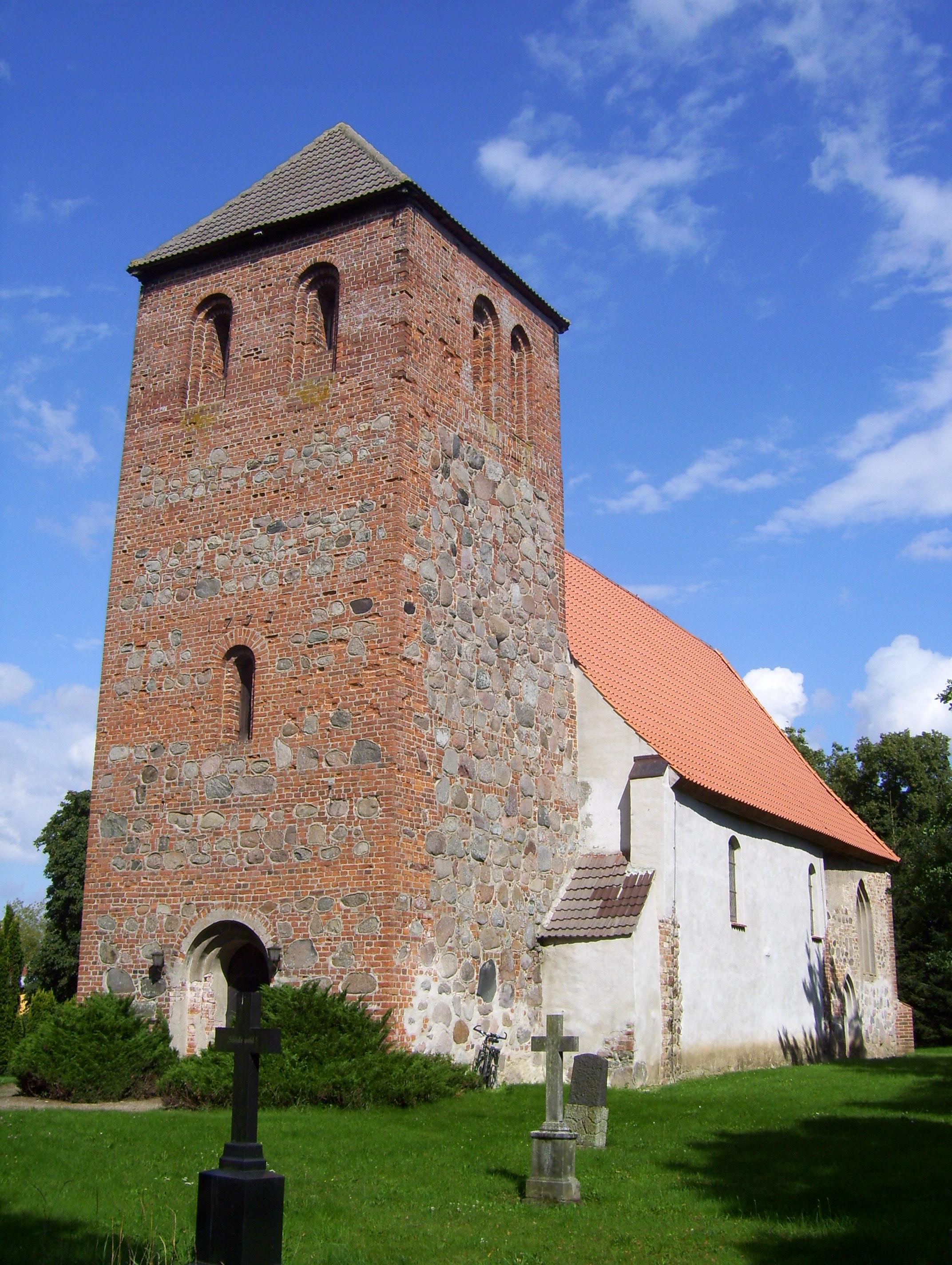 Kirche in Beggerow, Landkreis Demmin, Westturm